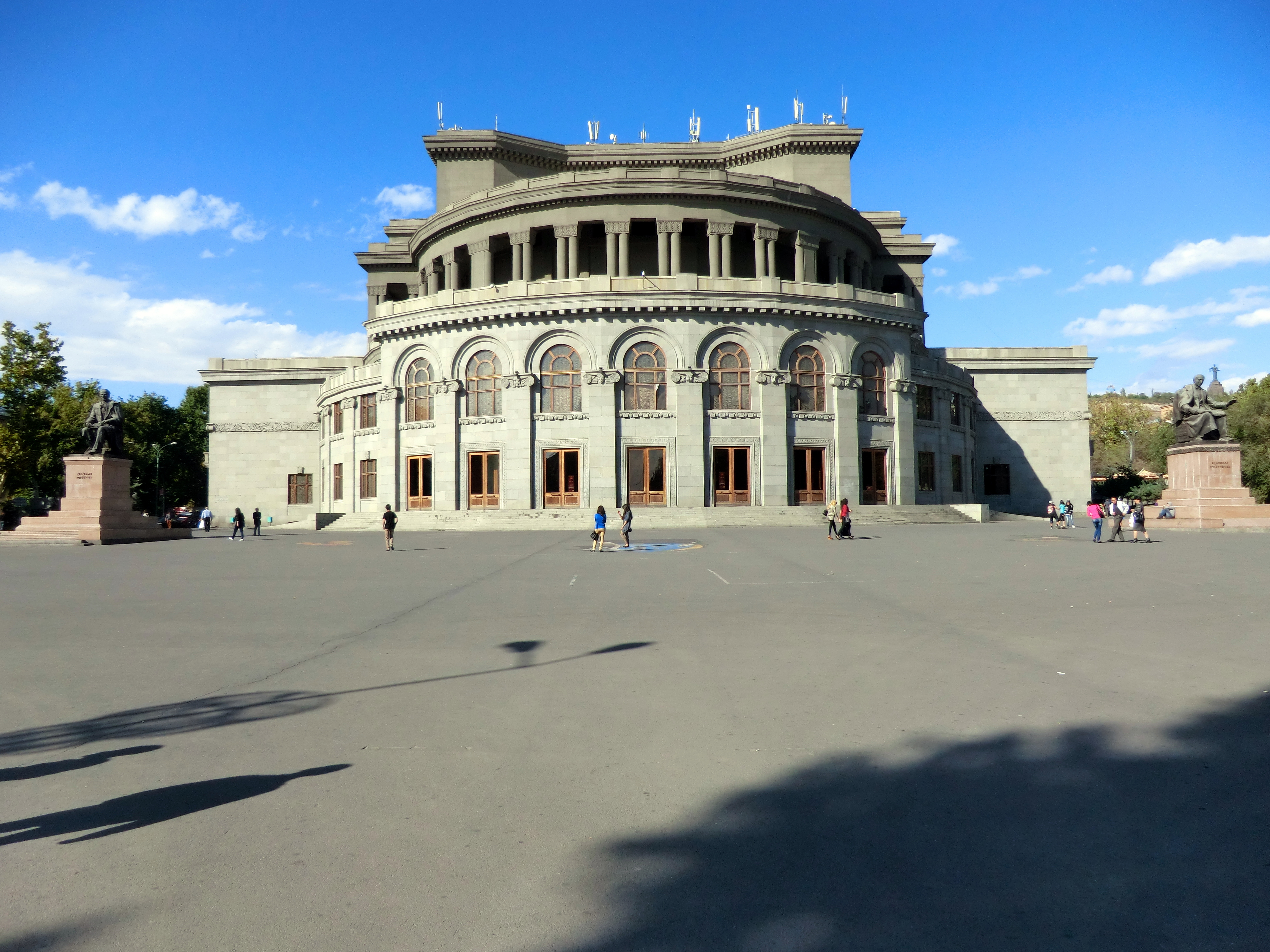 Vue de l'opéra d'Erevan ; façade Sud.